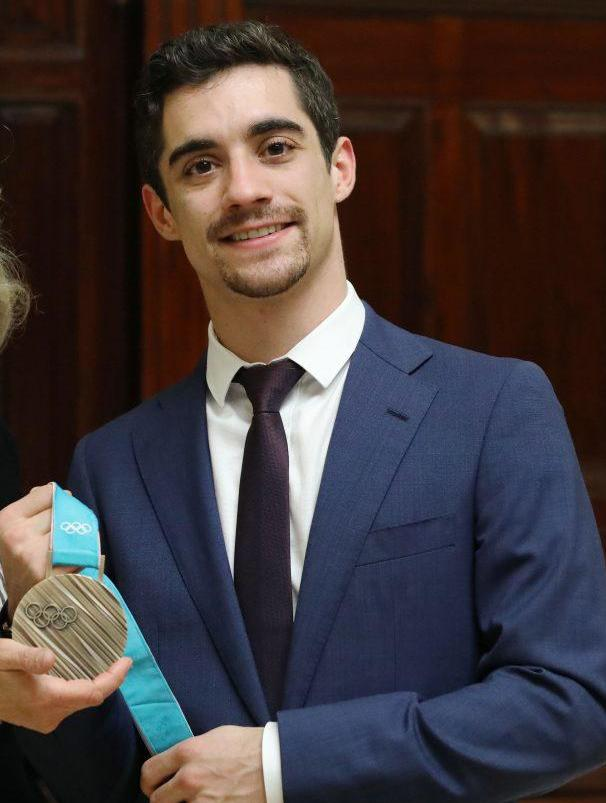 Hace apenas nueve meses, el patinador madrileño Javier Fernández entraba en la Galería de Cristal del palacio de Cibeles para recibir de manos de la alcaldesa la Medalla de Madrid, la máxima distinción de la ciudad. Hoy, martes 20 de febrero, lo ha hecho para ofrecer a los madrileños, a través de su alcaldesa, Manuela Carmena, otra medalla: el bronce ganado en los Juegos Olímpicos de Pyeongchang (Corea del Sur), el cuarto título español en la historia de las olimpiadas de invierno.